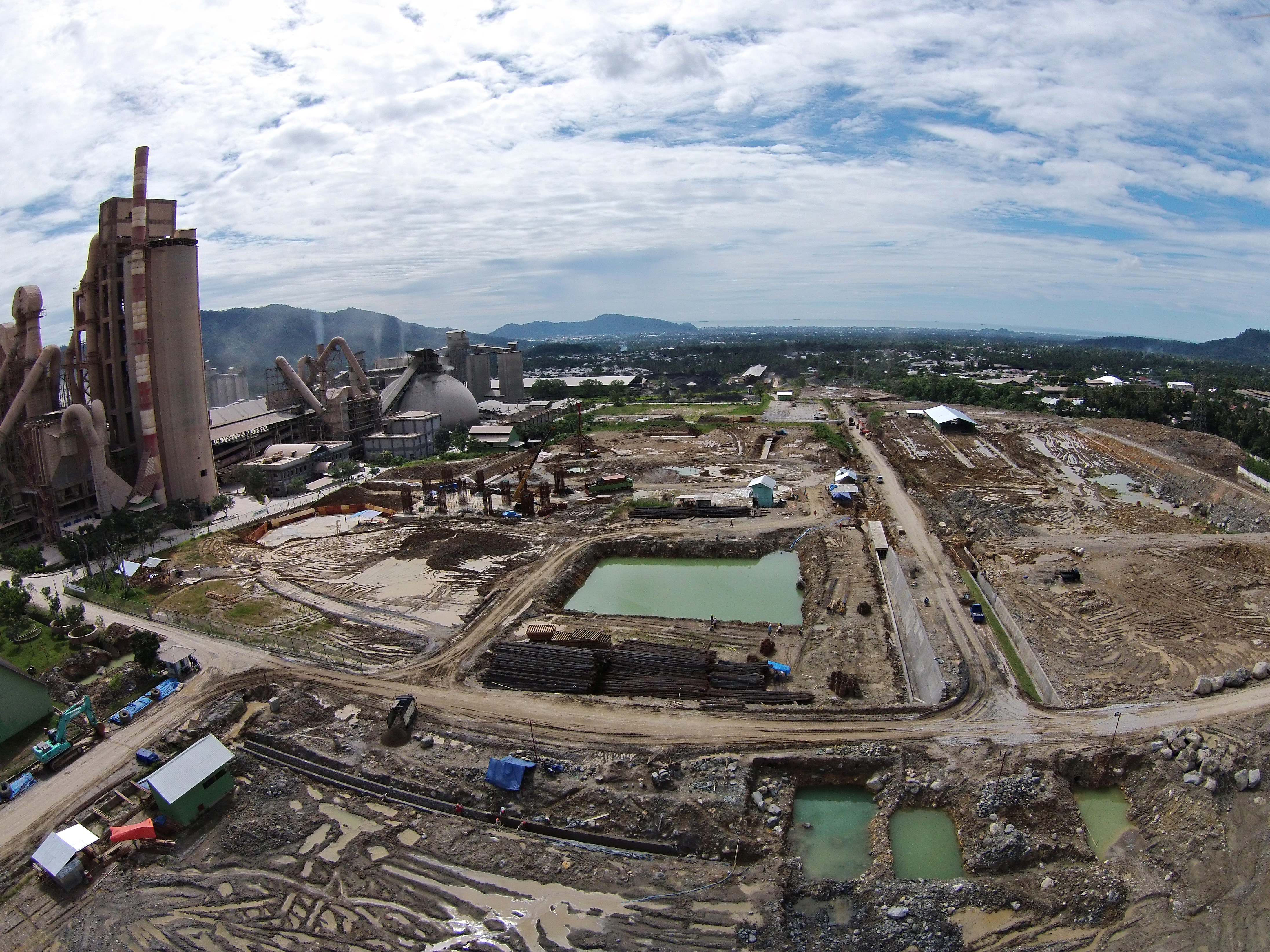 Semen Padang Disnakerin Kota Padang